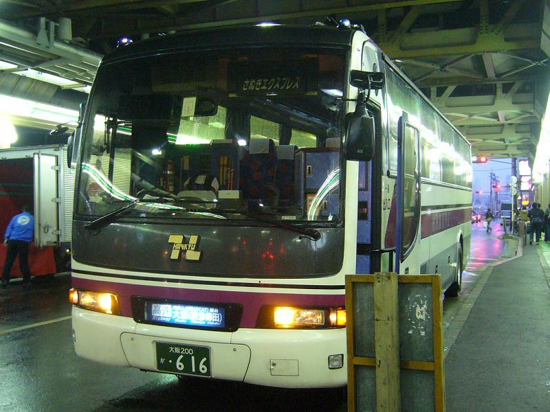 登録番号 大阪200か・616 阪急バス所属 高速用車両 （各系統で共通運用） 2007年3月24日 阪急三番街にて撮影